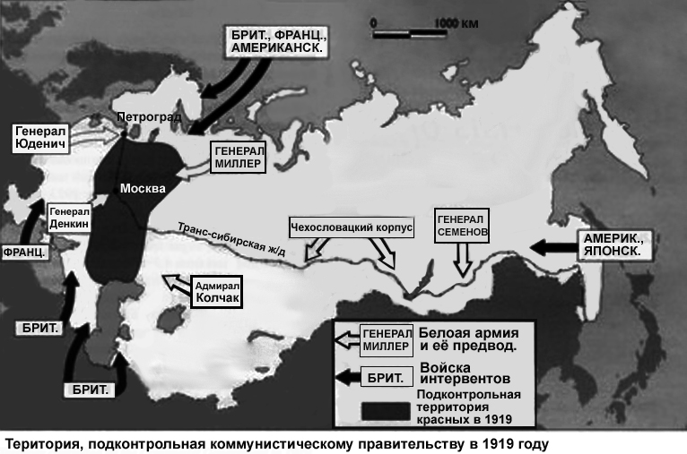 Иностранная военная интервенция в России, 1919 год